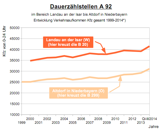 Verkehrsaufkommen Kfz 2004 bis 2014*) auf der A 92 erfasst durch die Dauerzählstellen Nr. 9017 Altdorf (O) und Nr. 9019 Landau an der Isar (W)